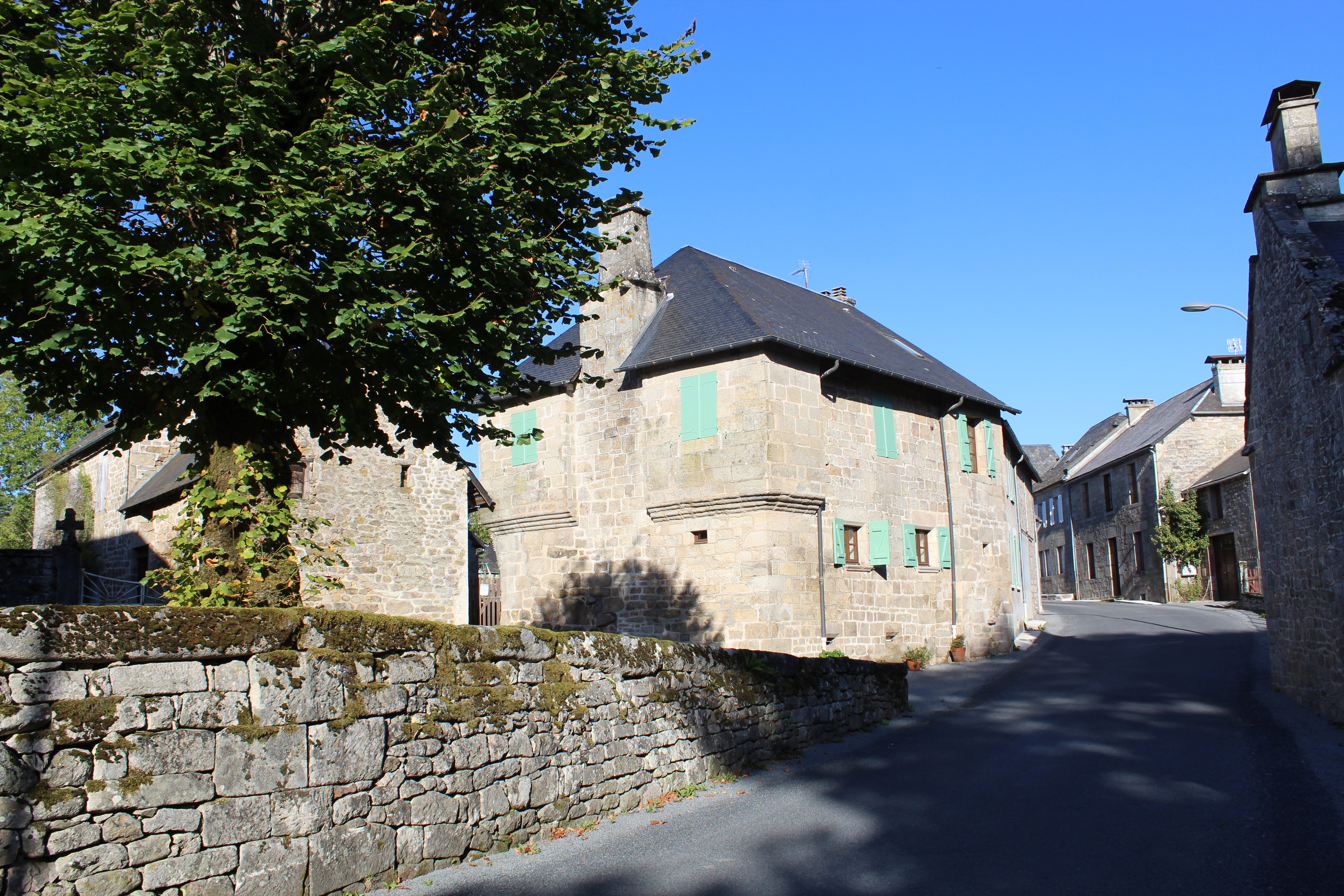 Vue de la rue principale